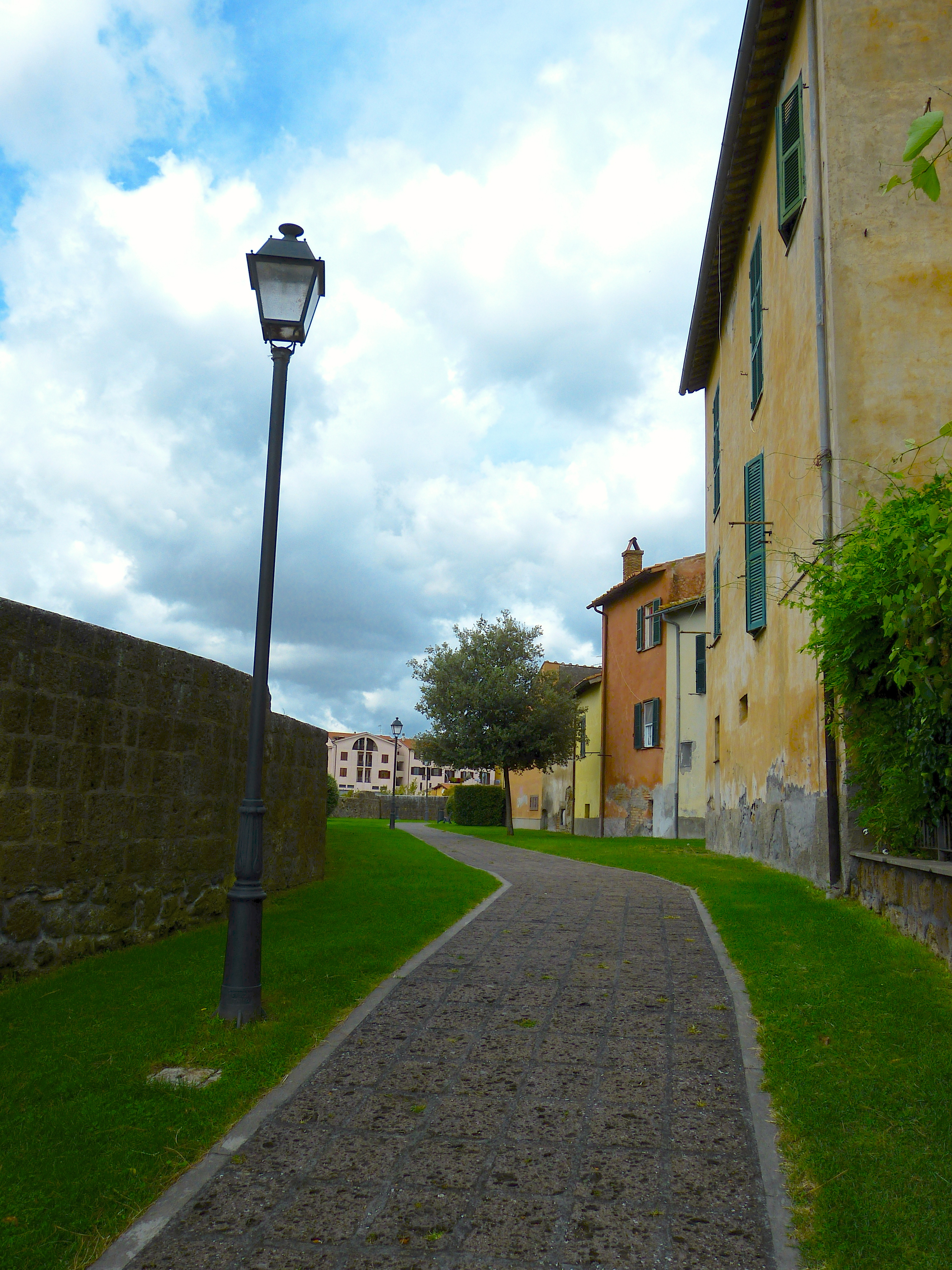 Parco Torre di Lavello This is a photo of a monument which is part of cultural heritage of Italy.